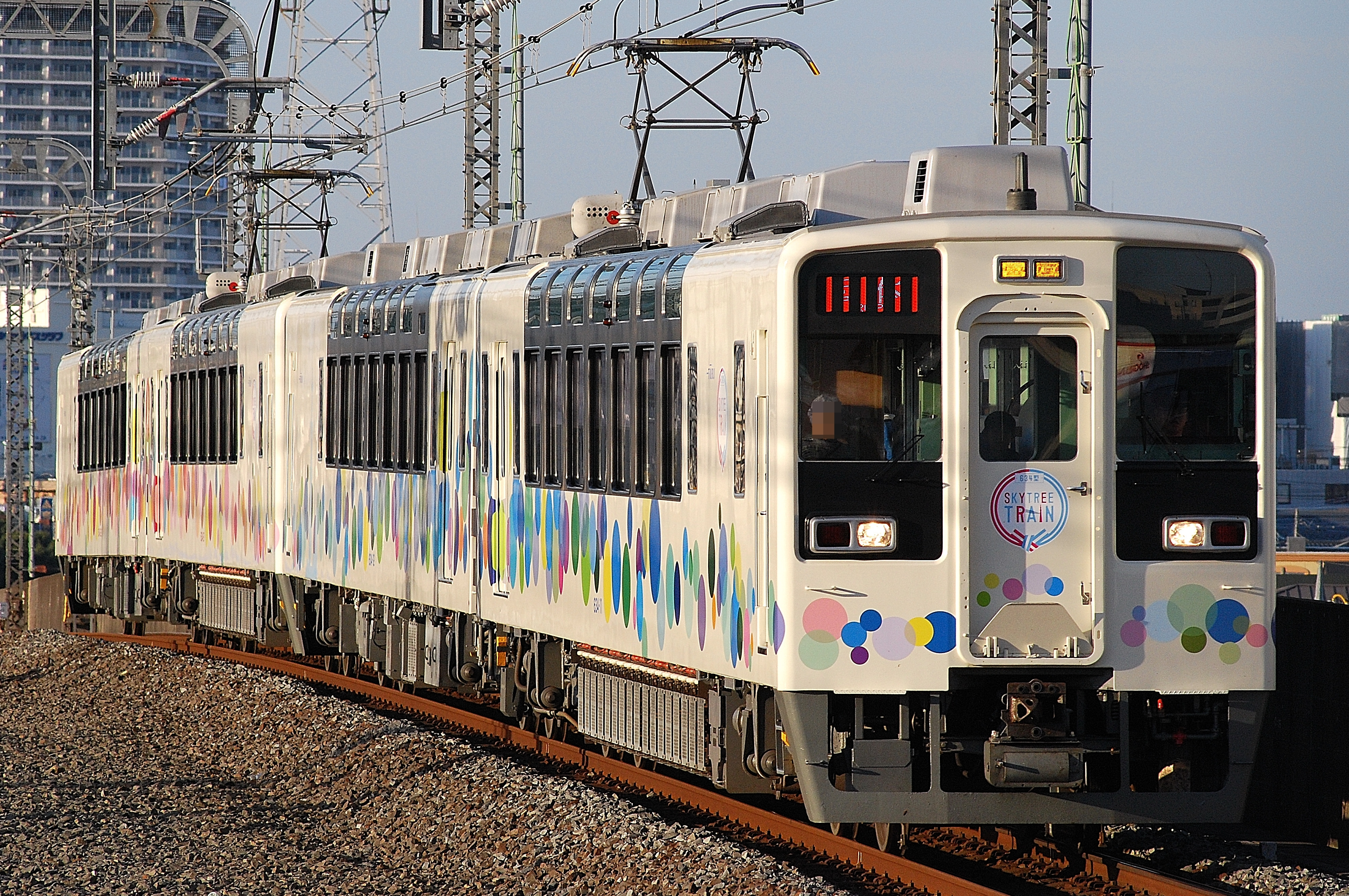 新越谷駅を通過する、東武634系「スカイツリートレイン」。（ホームから撮影）